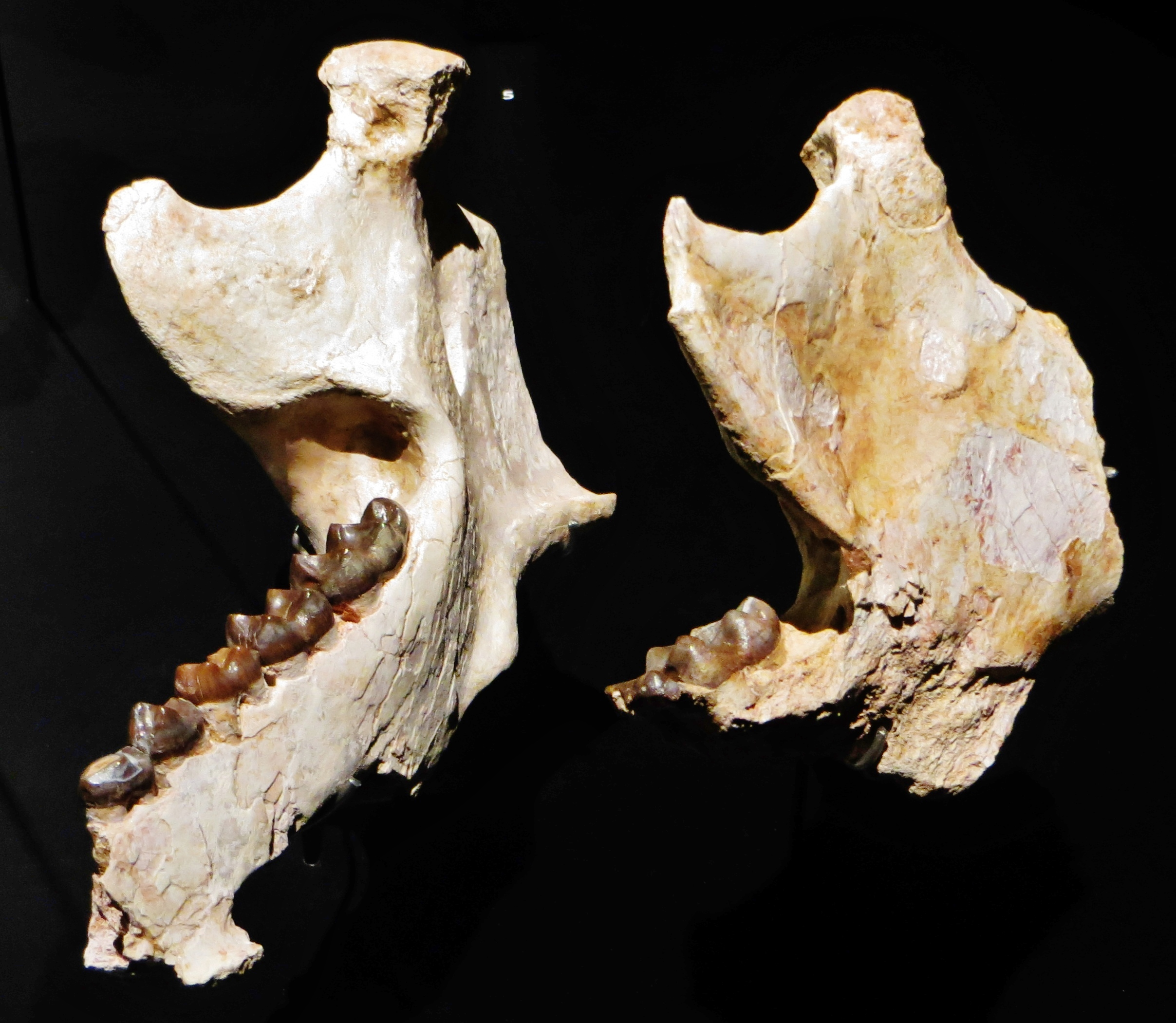 Fossil - Took the picture at Musee des Confluences, Lyon